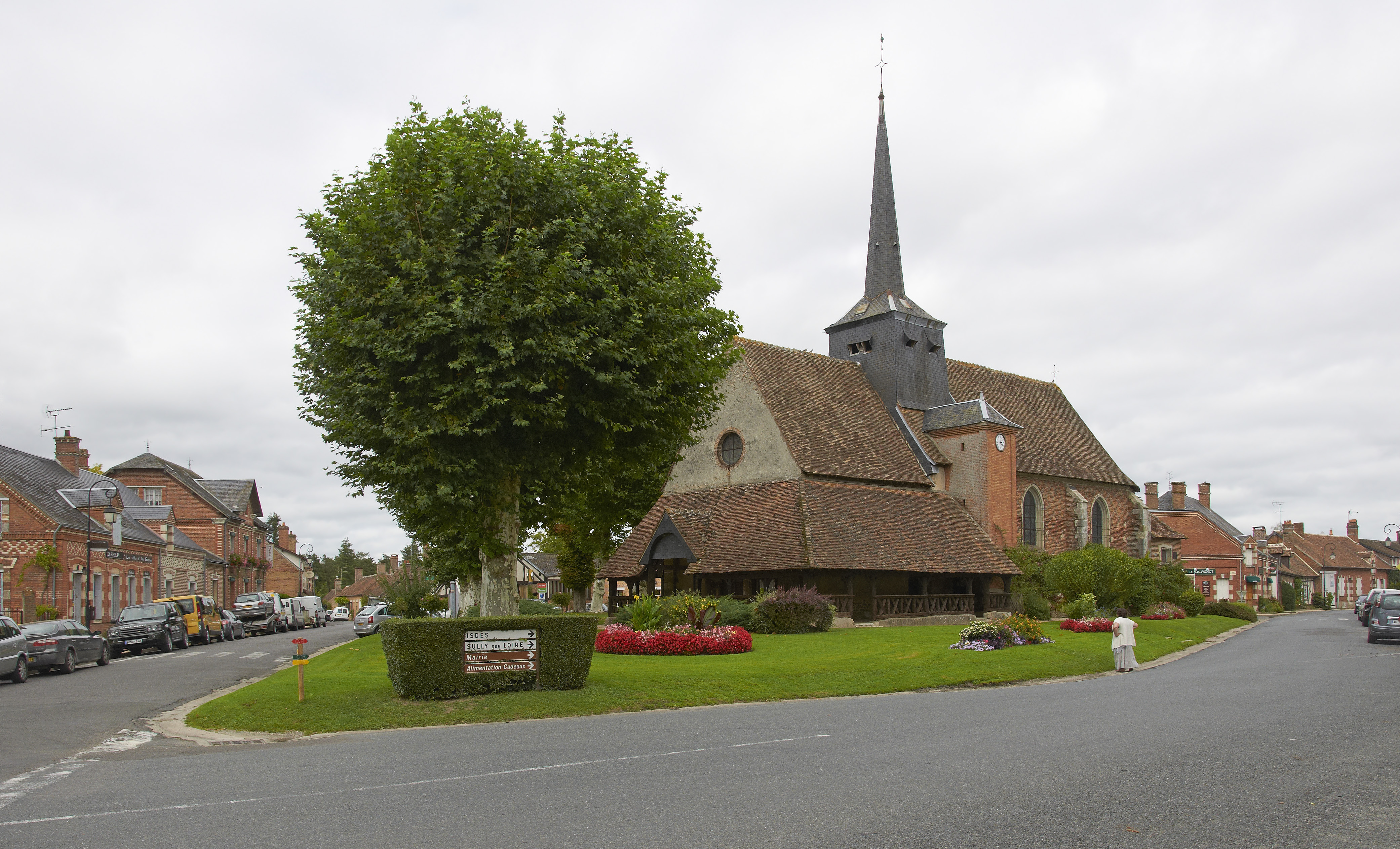 Église Saint-Martin de Souvigny-en-Sologne, France